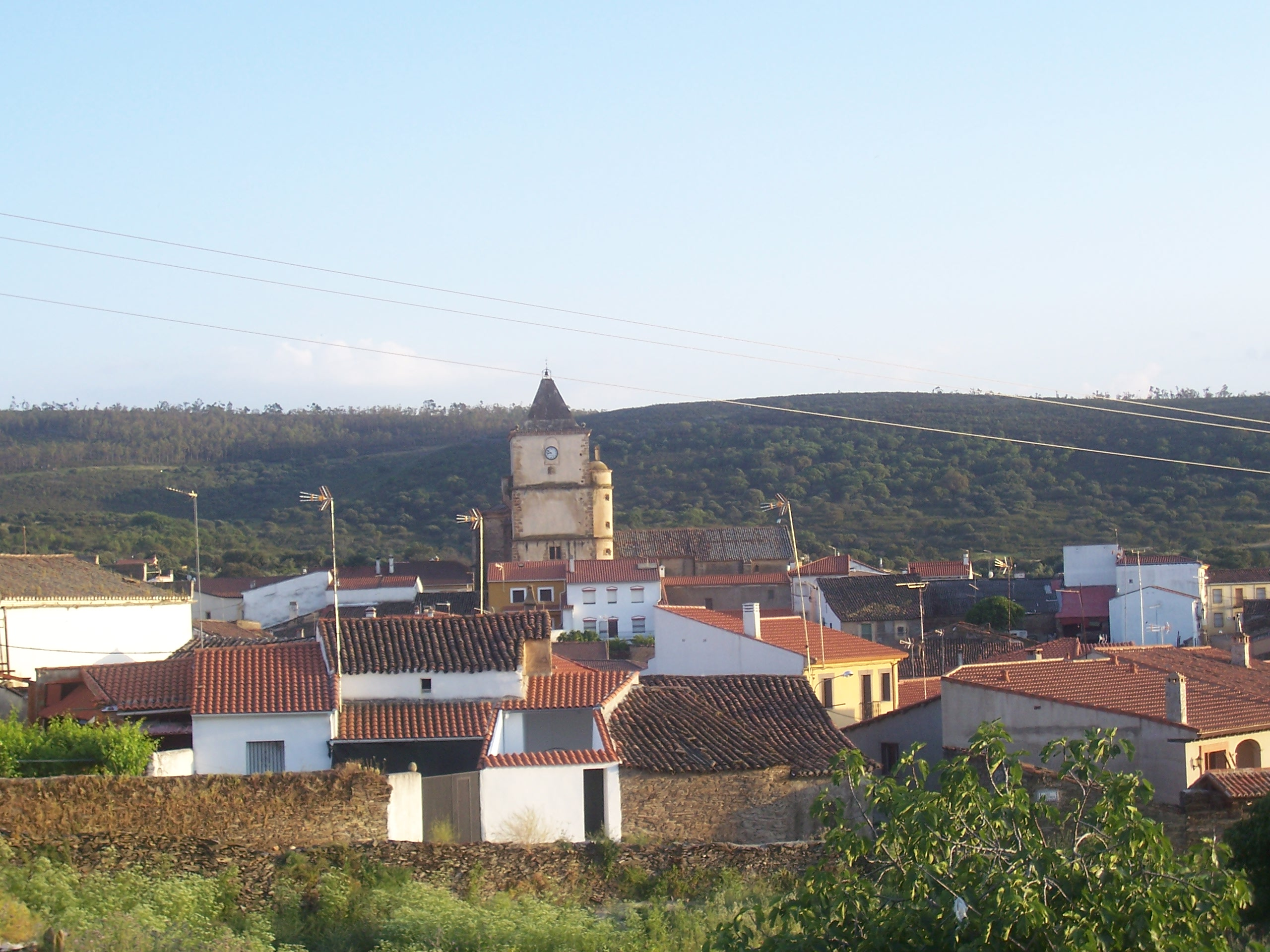 Vista de Serrejón (provincia de Cáceres, España) desde la ermita de San Antonio